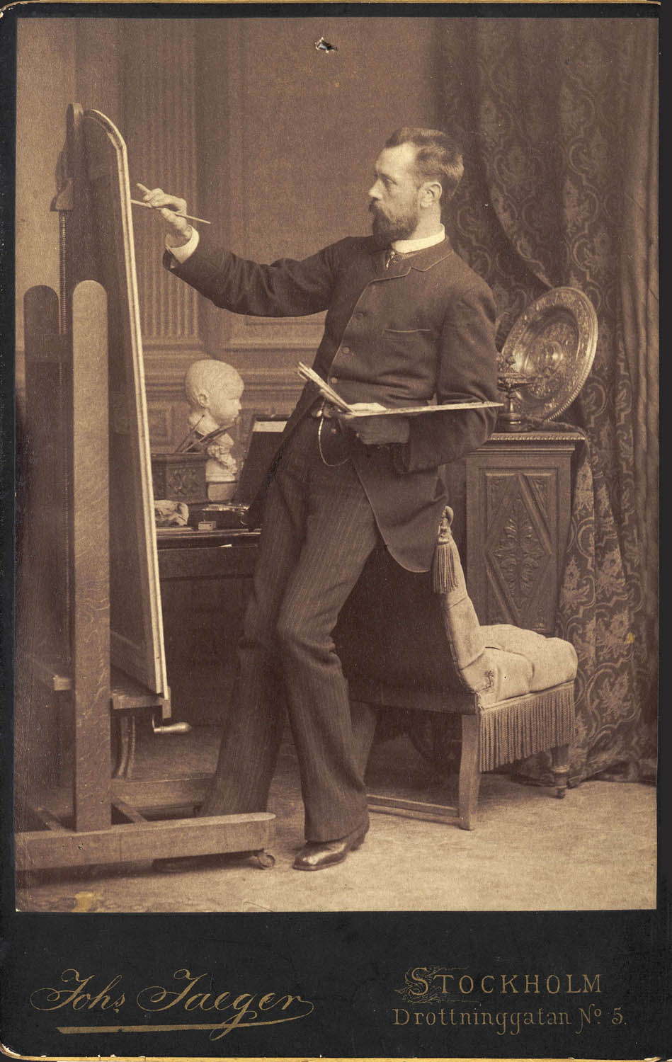 Depicted person: Julius Kronberg, Konstnär, Professor, Sverige (1850-1921)